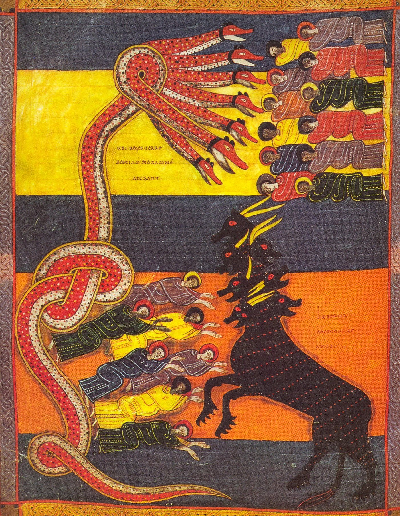 cristian maiquez carrillo @cmc es un gordo